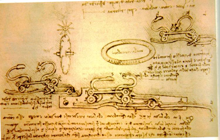 Schéma de Léonard de Vinci sur l'allumage automatique de la mèche d'une arme à feu.